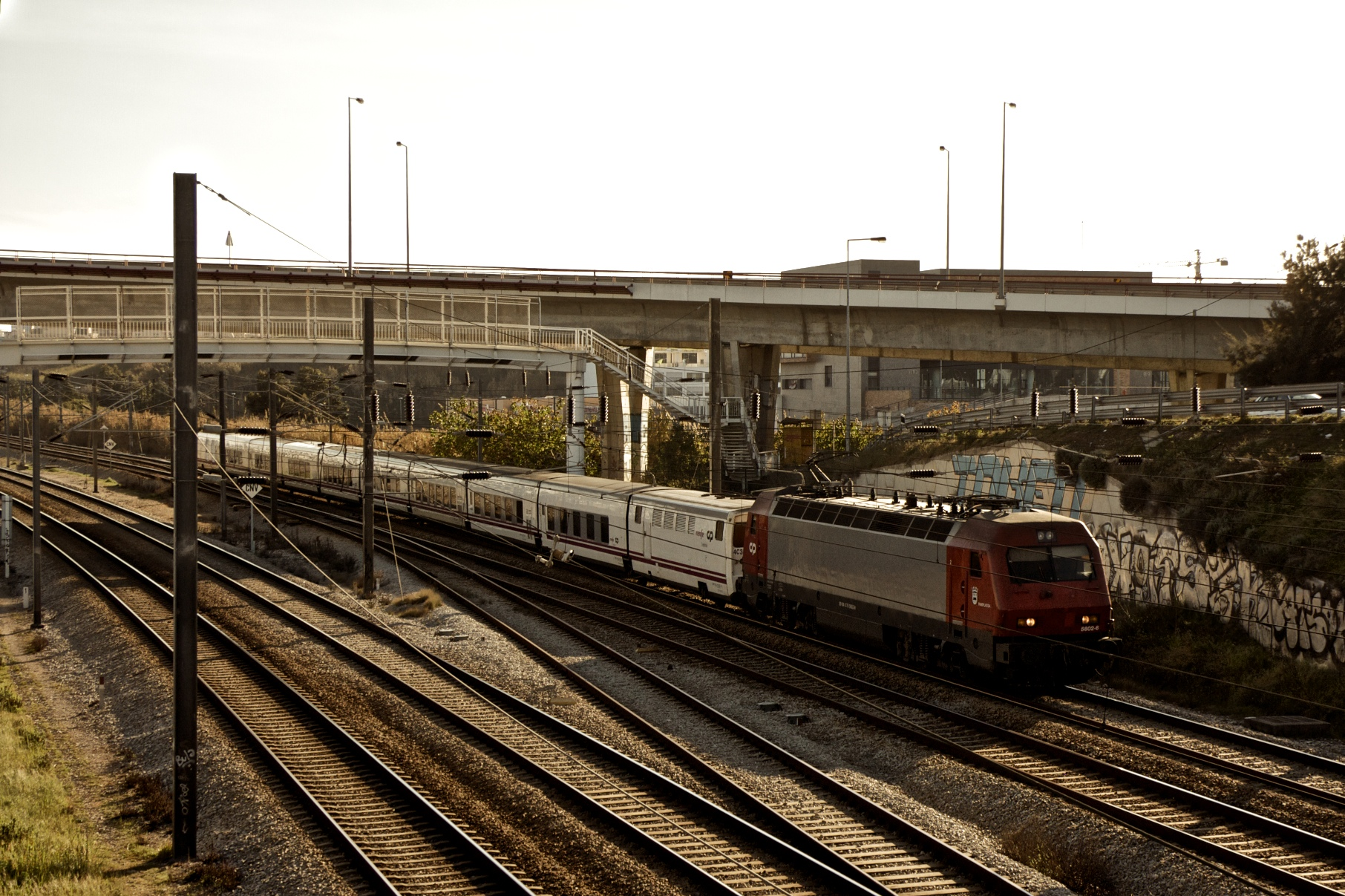 Tipo: Comboio Internacional Sud Expresso 311 [Lisboa • Santa Apolónia - Hendaye] Local: Bobadela [Linha do Norte, PK 10] Data e hora: 5 de Março de 2012 [16h45] Material: Locomotiva 5602 + composição Talgo IV (8 carruagens e 2 furgões)